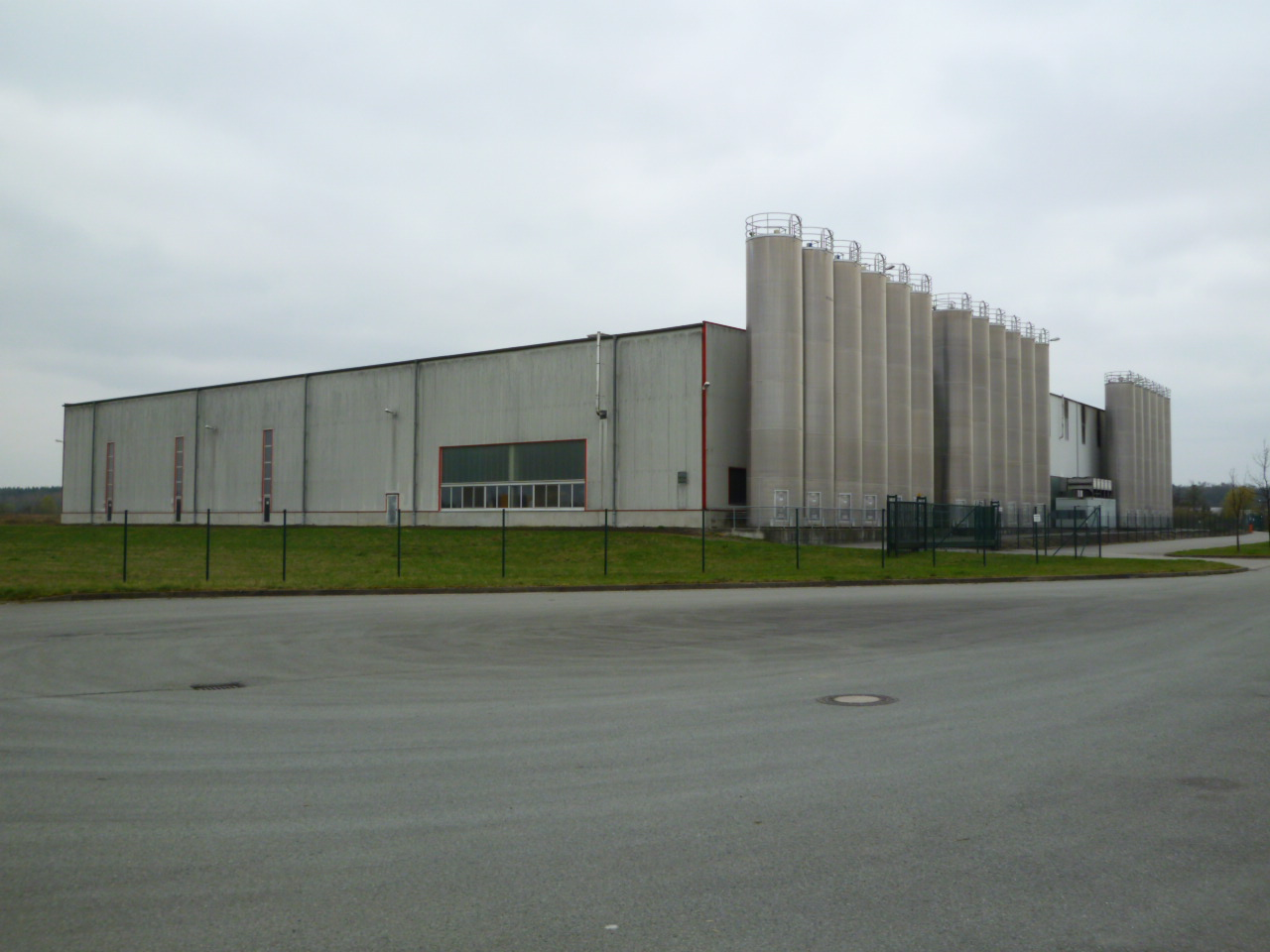 Firma HaTeFo in Calvörde, Gewerbegebiet Das neue Land